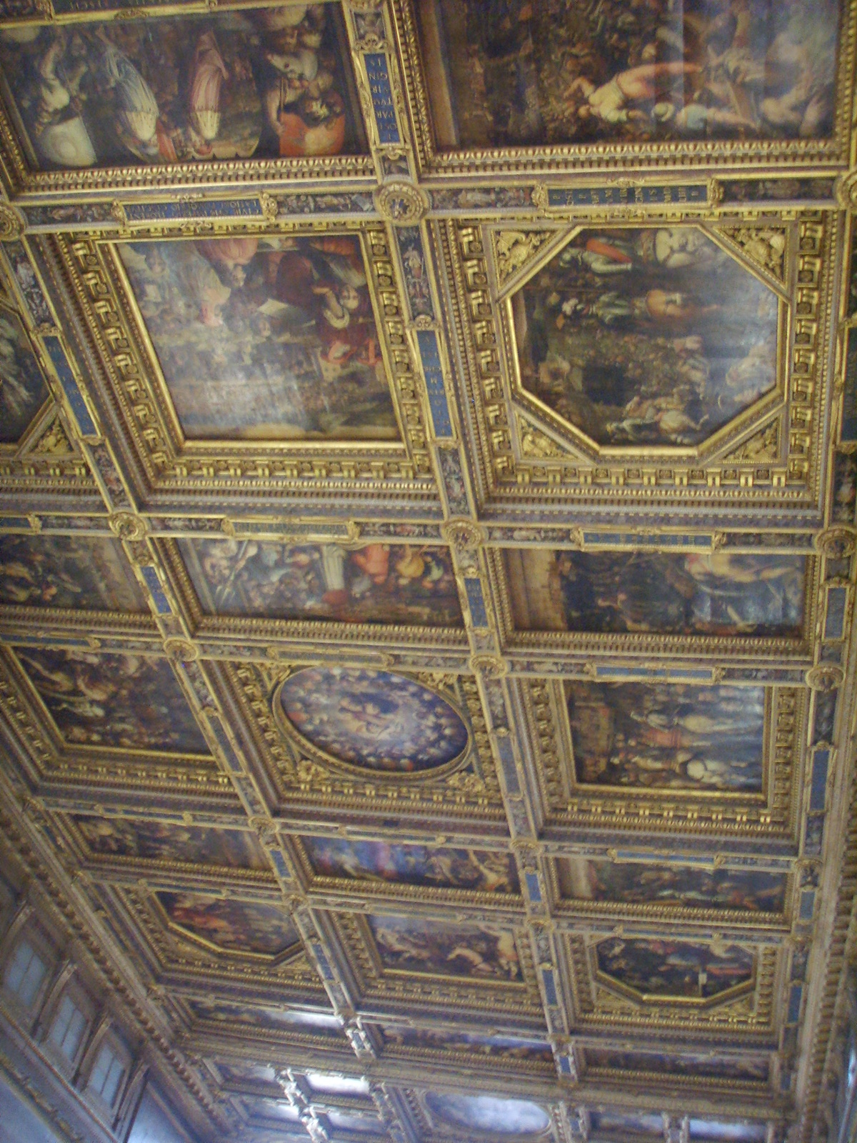 Palazzo vecchio, salone dei 500 soffitto